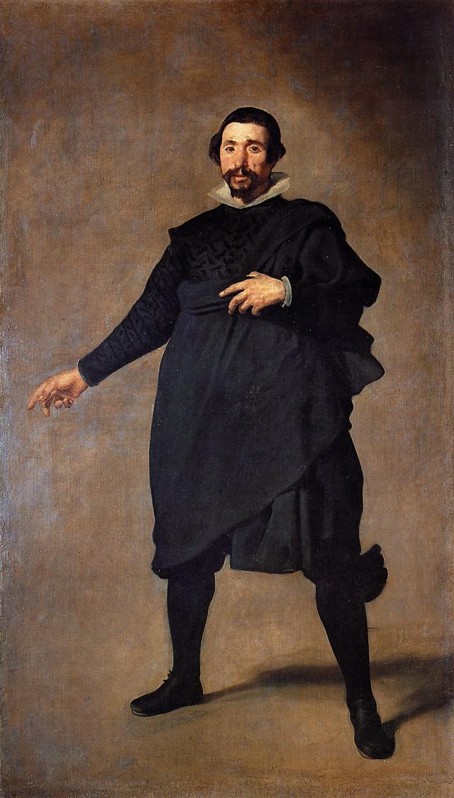 Retrato del bufón Pablo de Valladolid († 1648), que estuvo al servicio de la Corte española.